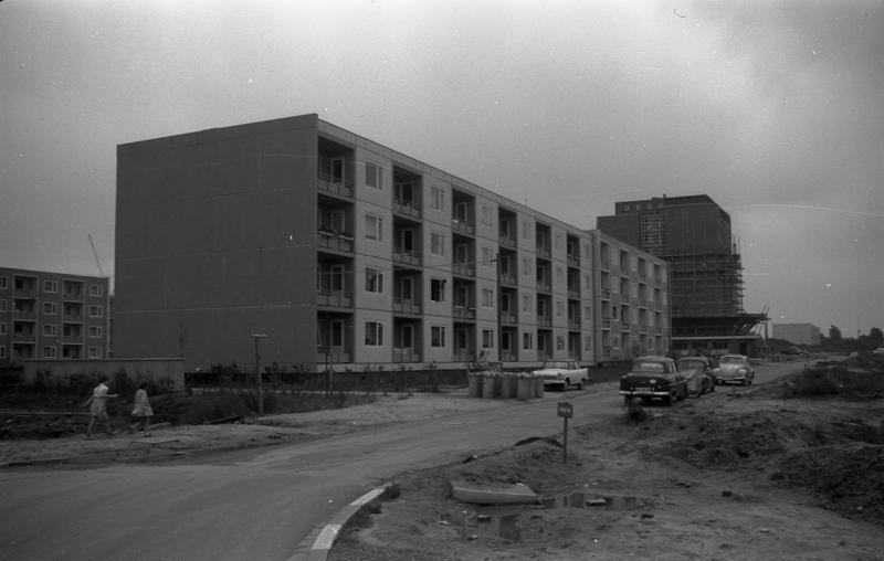 Hamburg-Hohenhorst Wohungsbau und Siedlungen